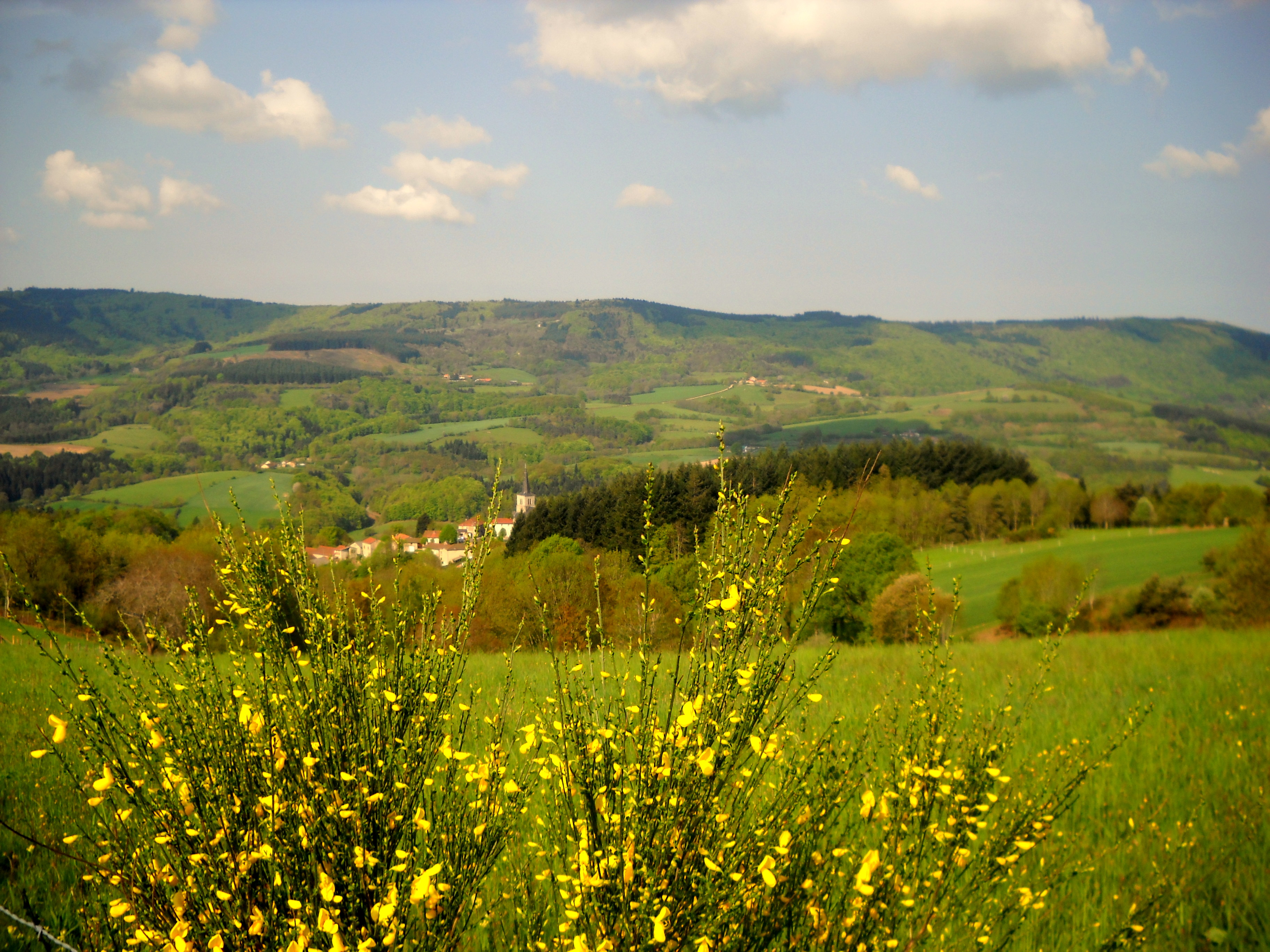 Le sentier pédagogique de La Chabanne (3,5 km/45 min) mène sur les chemins frais et ombragés, à travers une forêt de feuillus et de résineux et offre une vue panoramique sur la vallée de la Besbre.